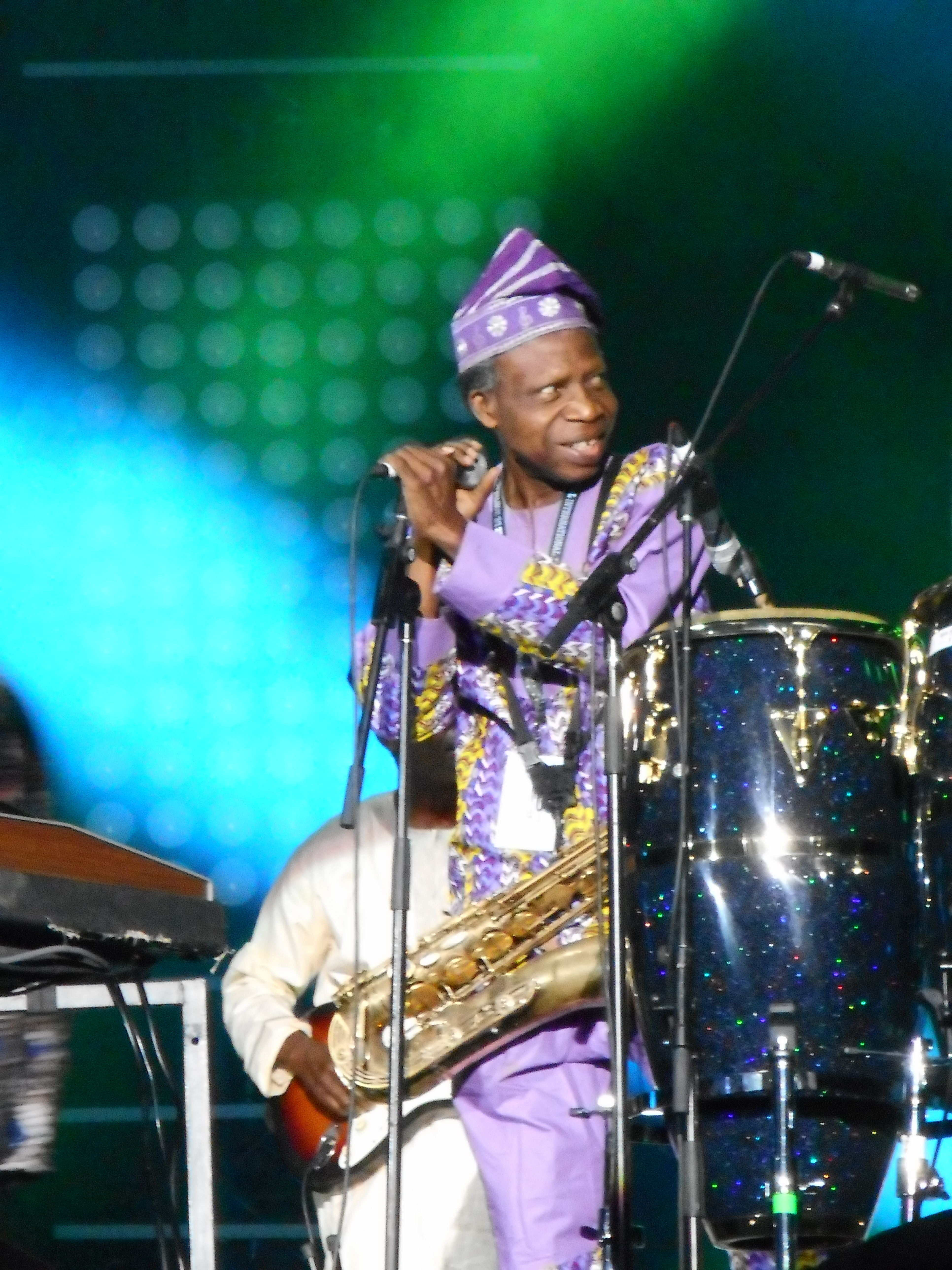 Spectacle de Orlando Julius & The Afrosoundz, le 6 juillet 2016, à la place des Festivals, dans le cadre du Festival international de jazz de Montréal